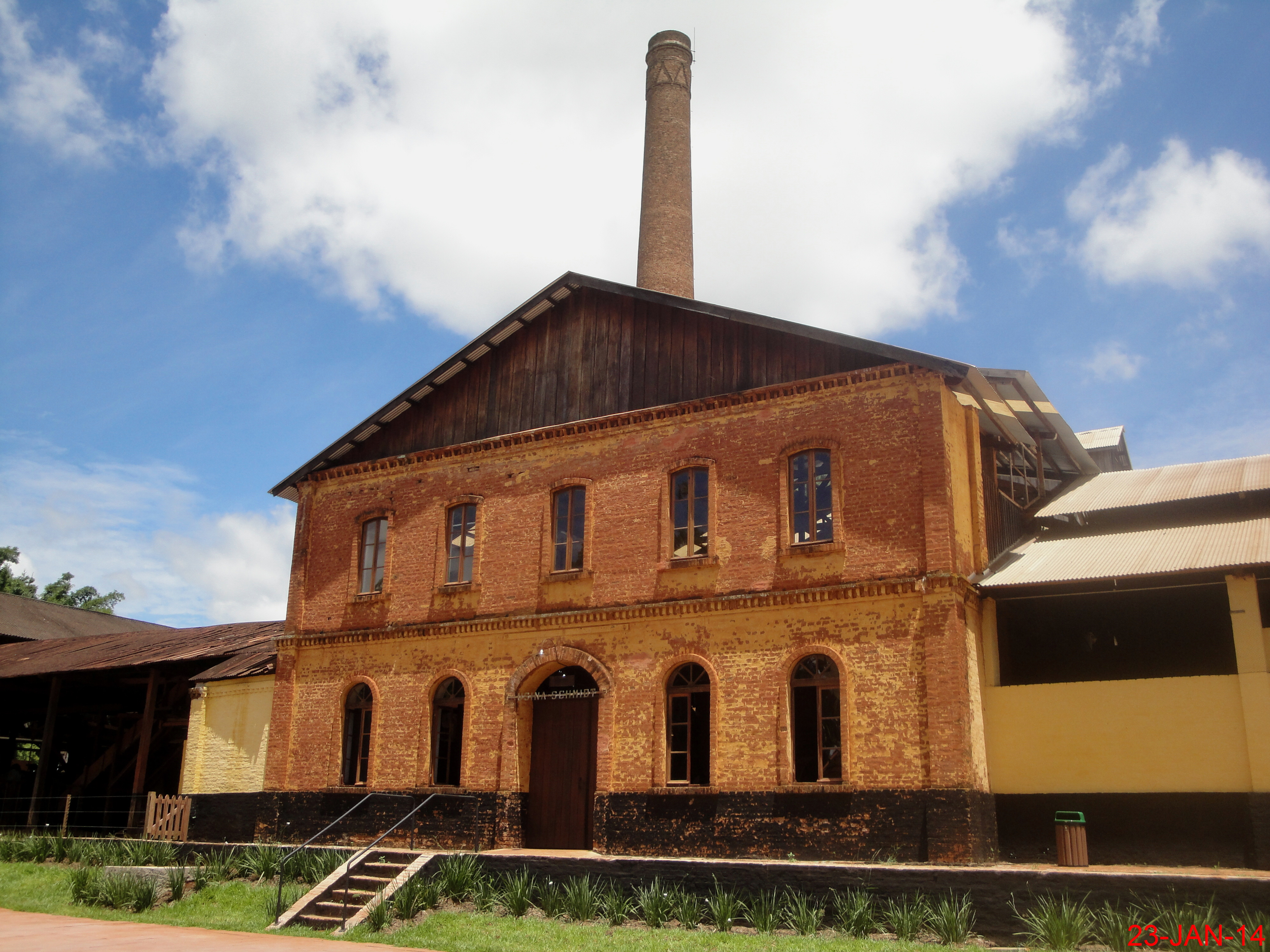 Museu Nacional do Açúcar e do Álcool, popularmente chamado de Museu da Cana, localizado no município de Pontal. Quando o Engenho Central foi construído em 1903, o local pertencia ao município de Sertãozinho/SP. Localizado em uma área de 13 hectares, o Museu está erguido em um dos pontos históricos mais importantes da cultura canavieira brasileira, a região de Sertãozinho.